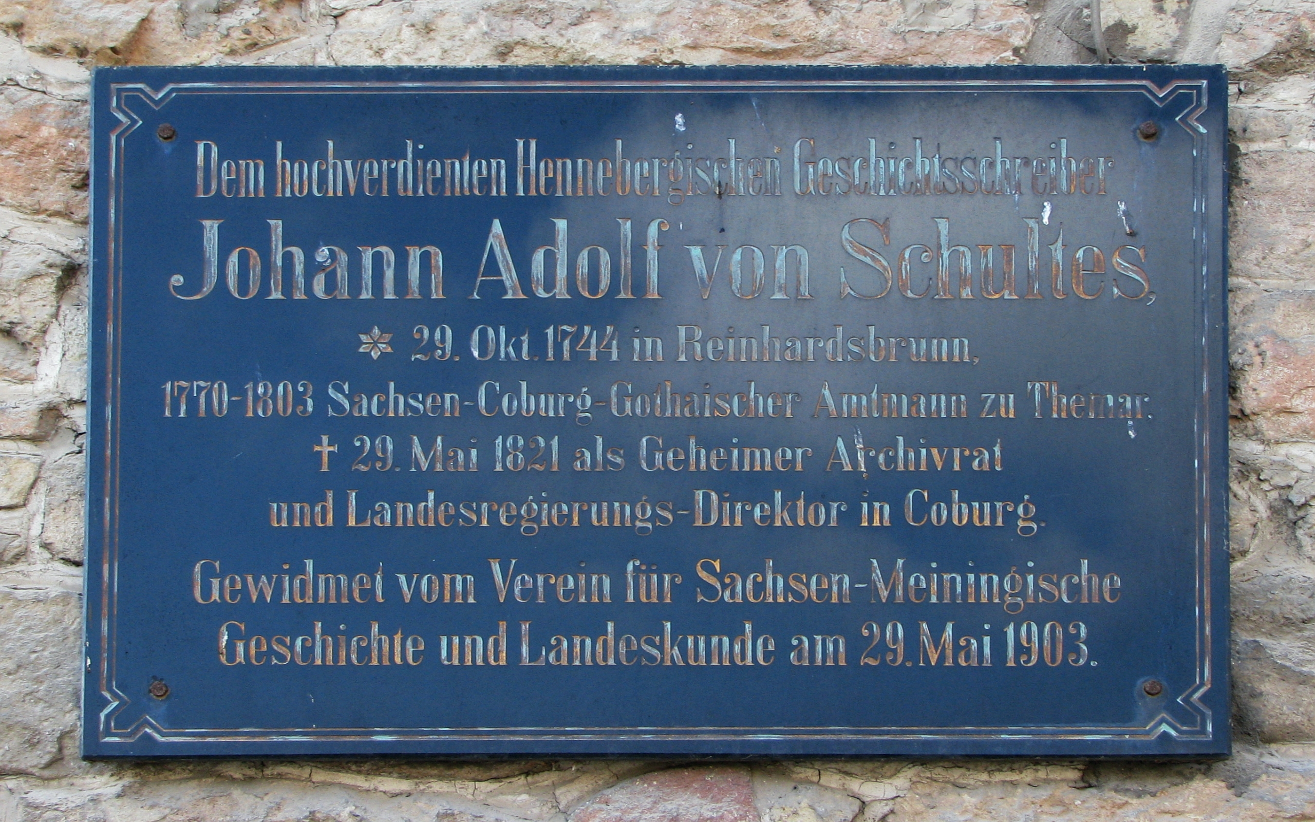 Gedenktafel Johann Adolf von Schultes - Herzogtum Sachsen-Coburg und Gotha. J.A. von Schultes war von 1770-1803 Amtmann zu Themar in Thüringen. Foto Wolfgang Pehlemann IMG_2717